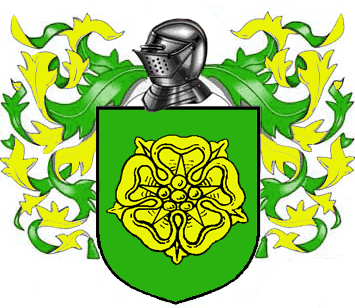 Estandarte creado con photoshop usando material libre o creado ex profeso por mi e inspirado por las obras de Canción de Hielo y Fuego.